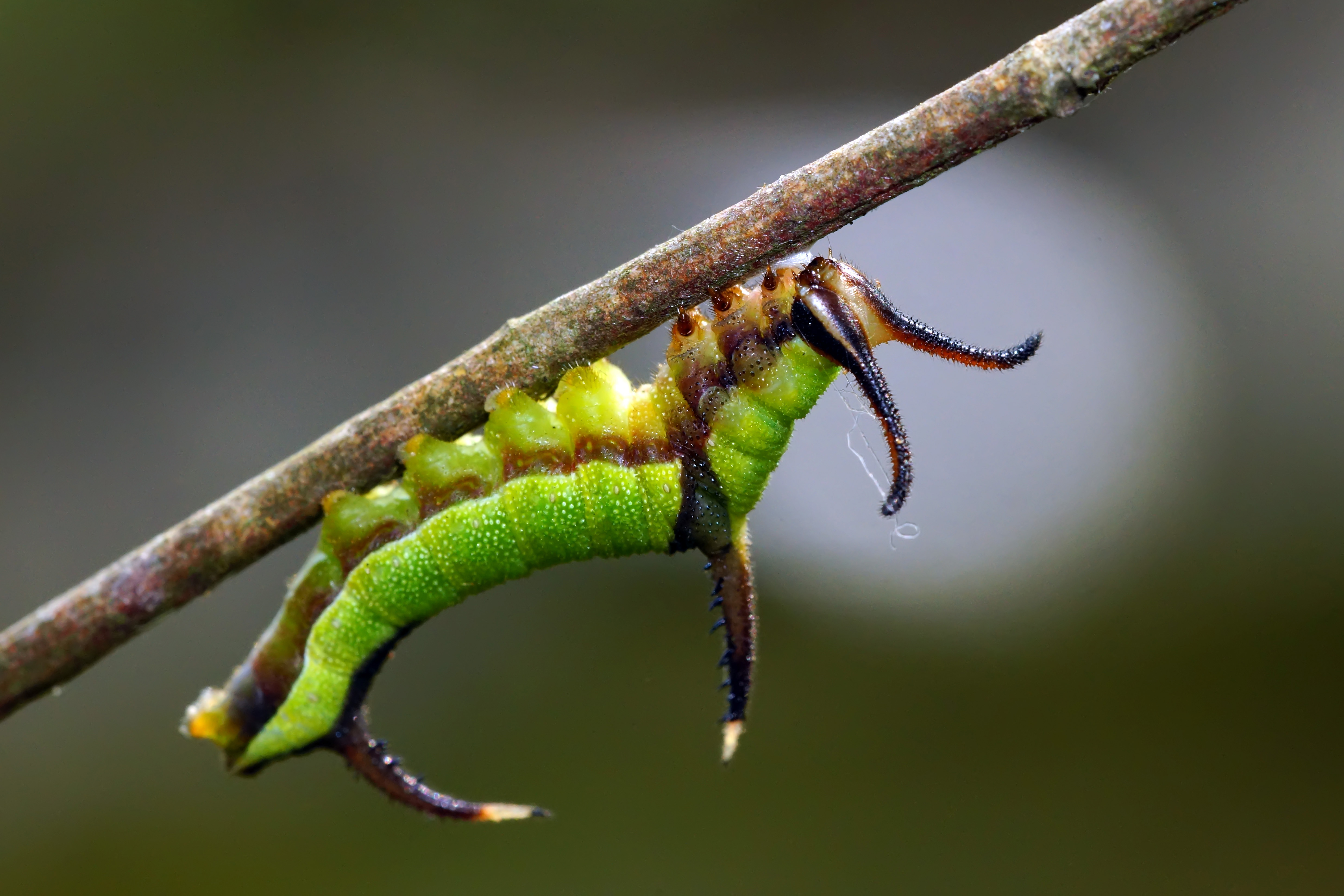 網絲蛺蝶 Cyrestis thyodamas formosana